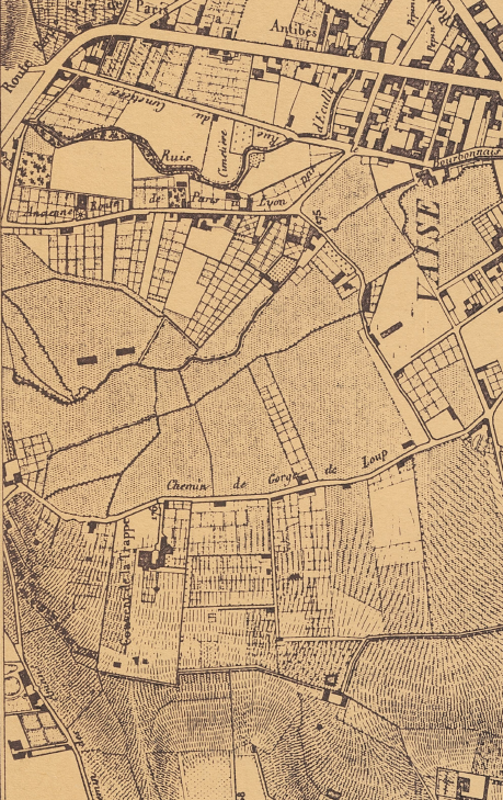 Extrait du Plan topographique de la ville de Lyon et de ses environs en 1847 - Quartier de Vaise